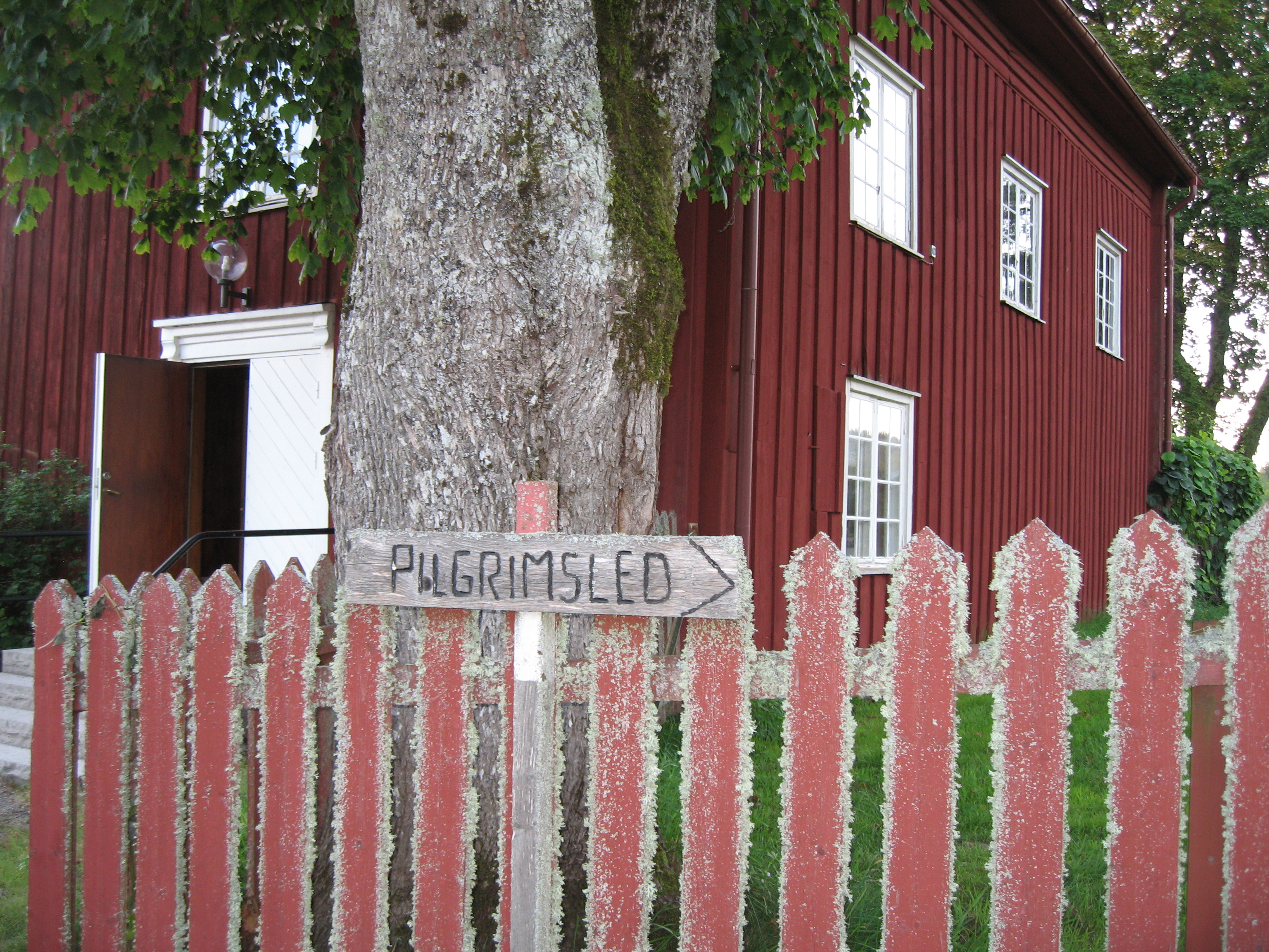 Pilgrimsleden i Dalsland har sin ena ände vid grusvägen som leder till Edsleskogs prästgård i Åmåls kommun. I bakgrunden syns prästgårdens östra flygel.